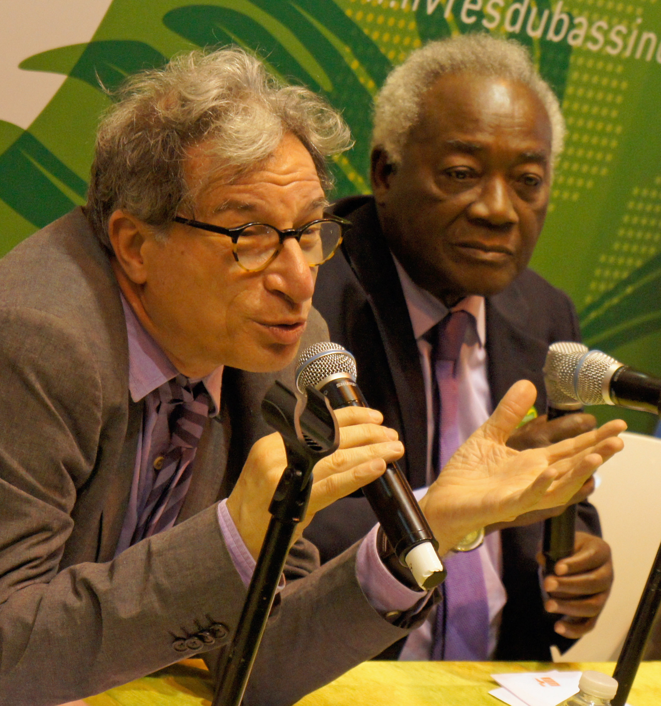 Yvan Amar et Stanislas Adotevi au salon du livre 2012, lors de la table ronde sur les auterus du bassin du Congo.